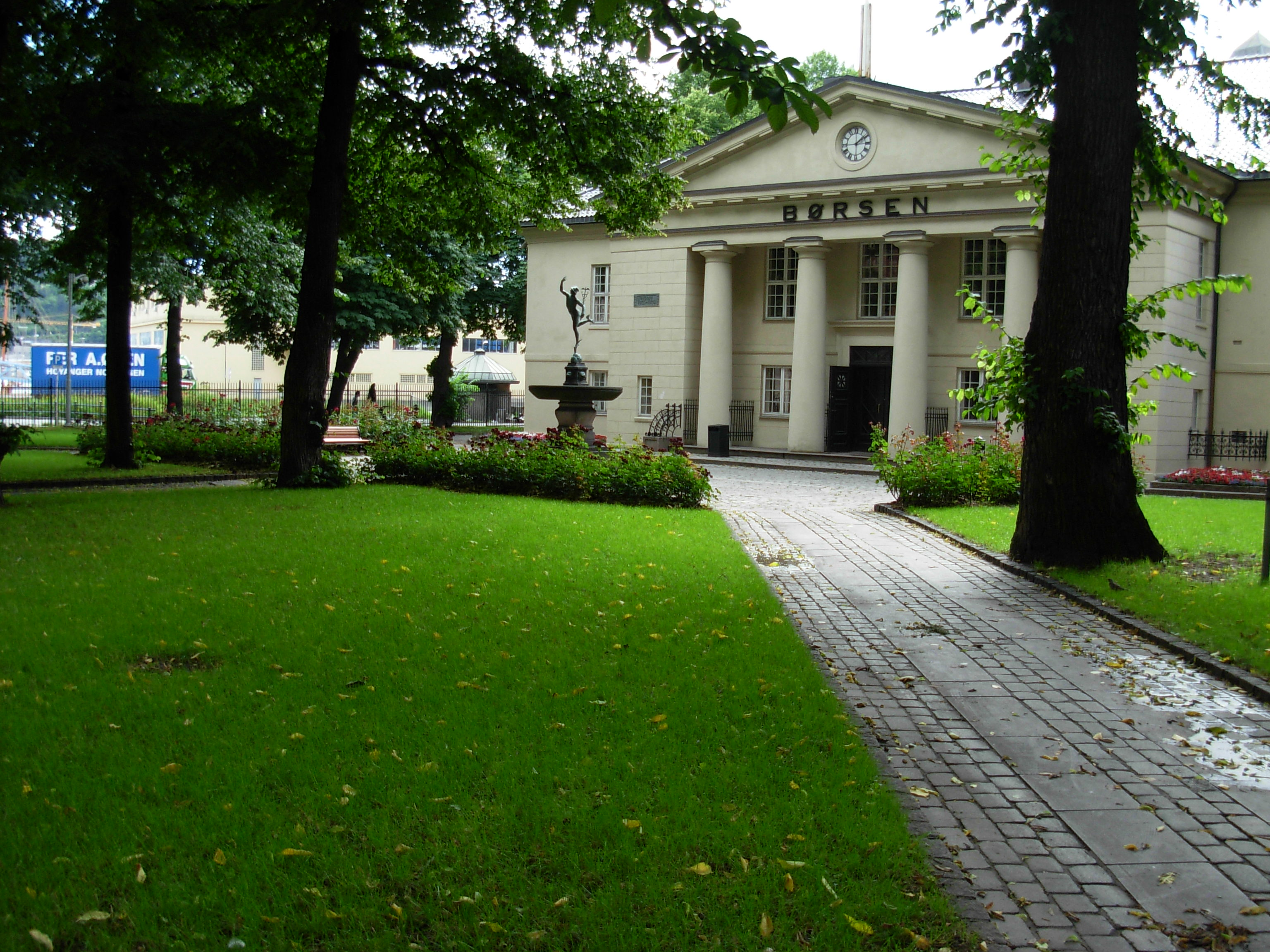 Børshaven, Oslo